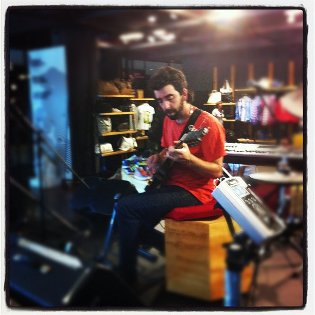 Pedropiedra probando sonido en Puma Lab